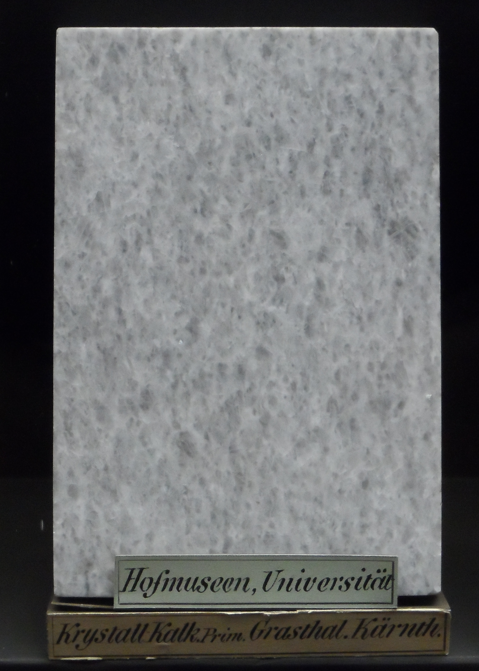 Stück Krastaler Marmor als Sammelobjekt im Naturhistorischen Museum Wien